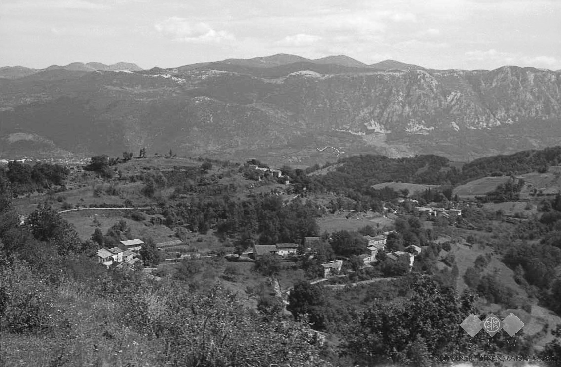 Erzelj, zaselki Miški, Volki, Mesesneli.